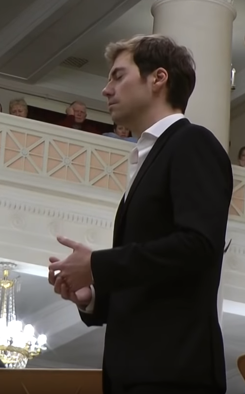 Валер Барна-Сабадус